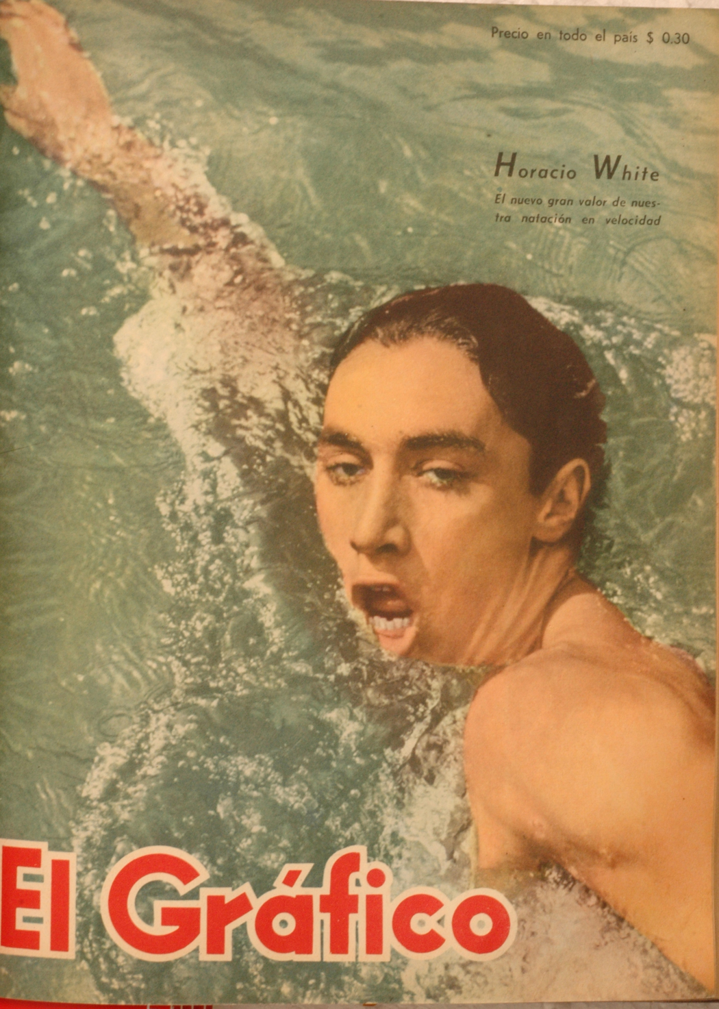 El Grafico del 05 de Marzo de 1948. Edicion 1495